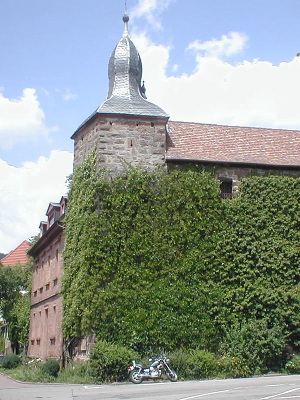 „Blauer Hut“ in Eberbach/Neckar